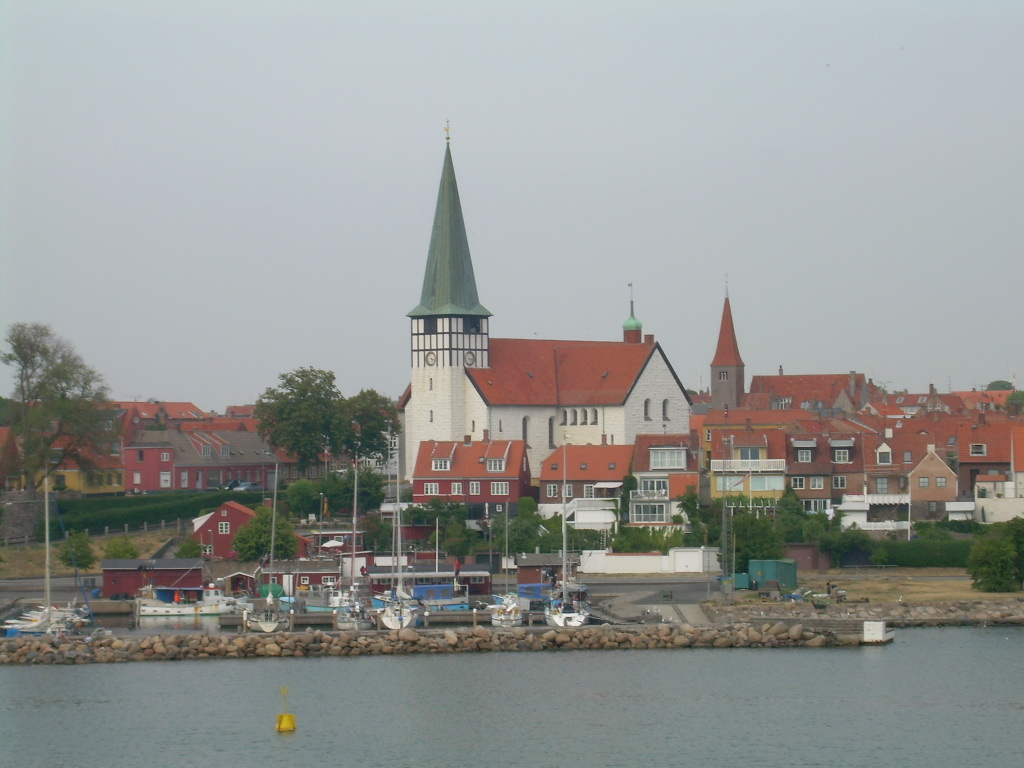 Rønne - Sct. Nicolai Kirke, Bornholm, Denmark